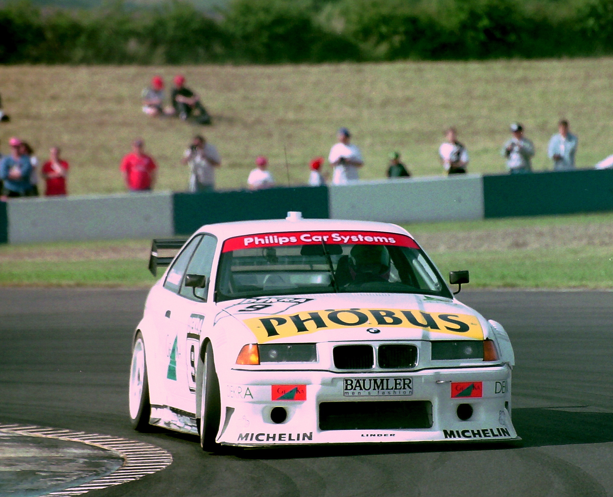 Frank Schmickler - Linder Rennsport GMBH - BMW E36 at Melbourne Hairpin